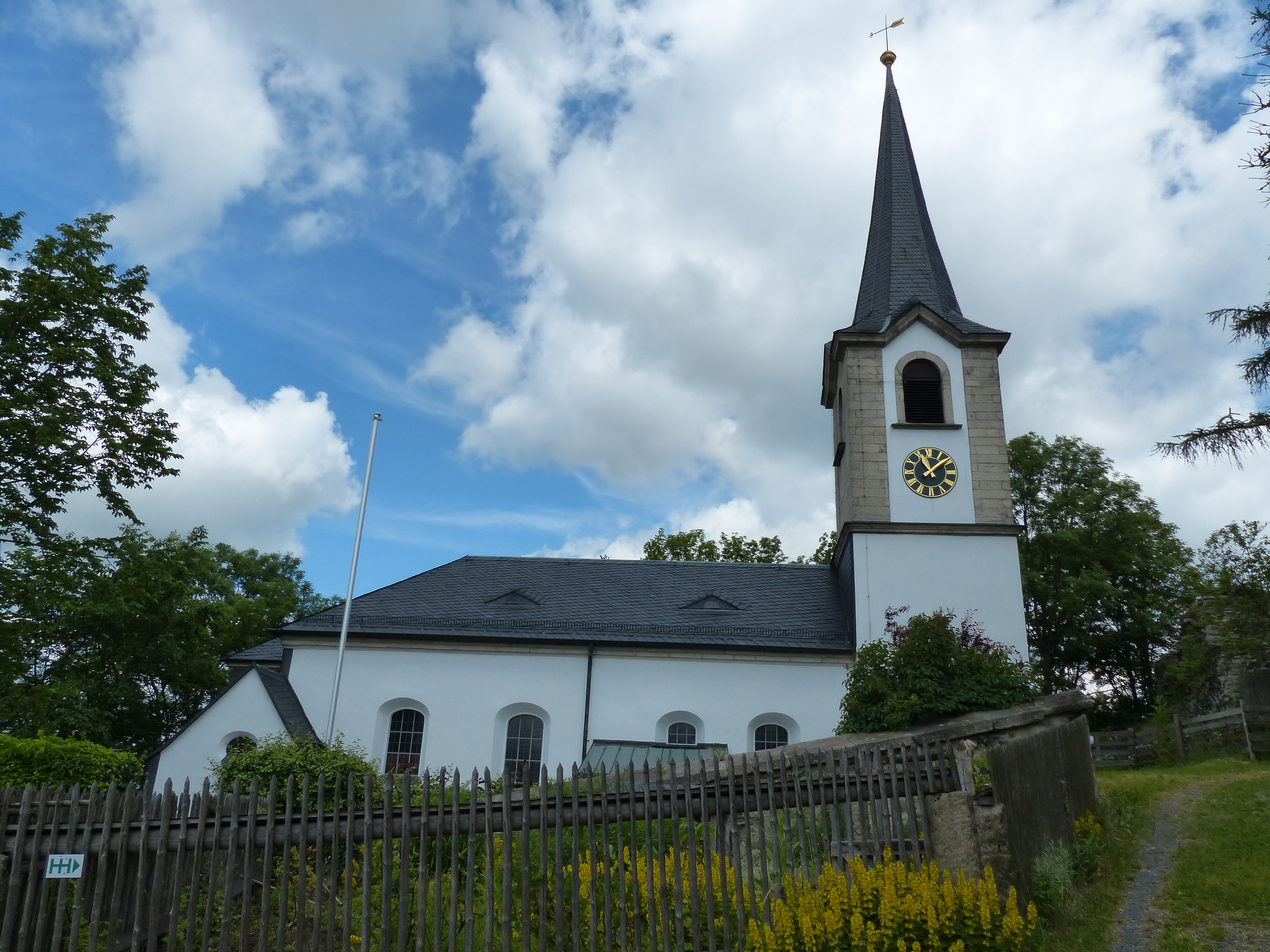 Hallerstein, Ortsteil von Schwarzenbach an der Saale